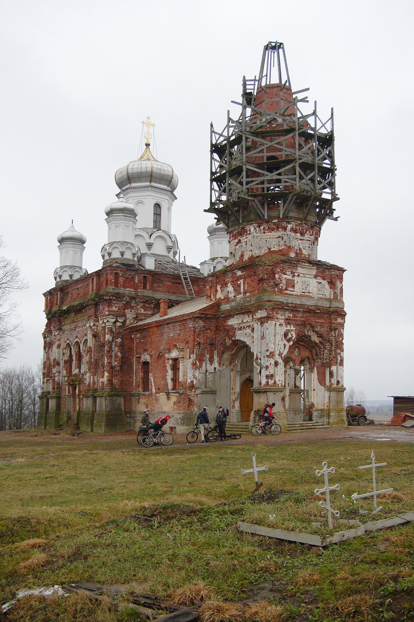 Церковь царицы Александры, Низино. Church of tsarina Alexanders, Nizino.